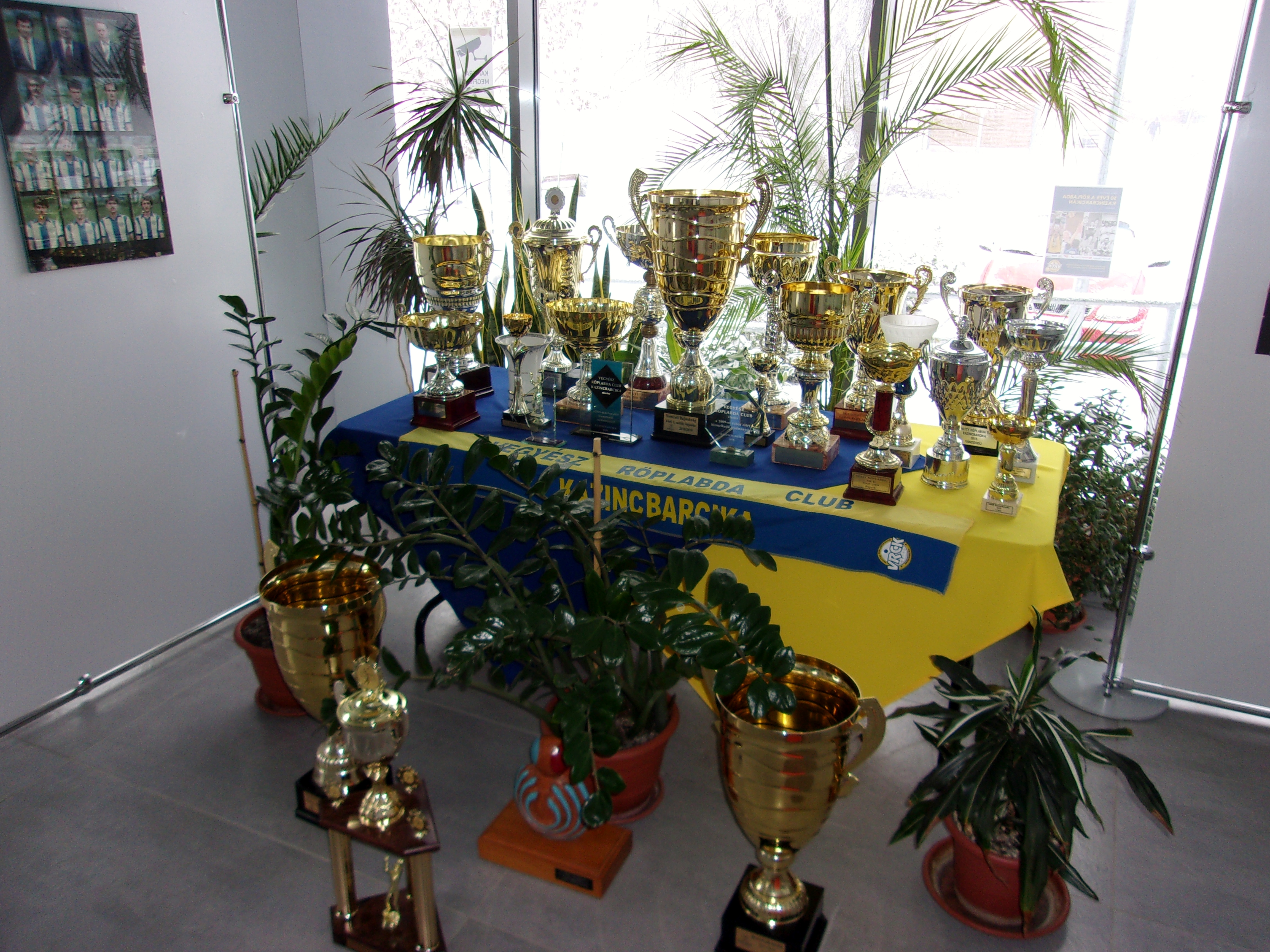 50 éves a Vegyész Röplabda Club Kazincbarcika - emlékkiállítás